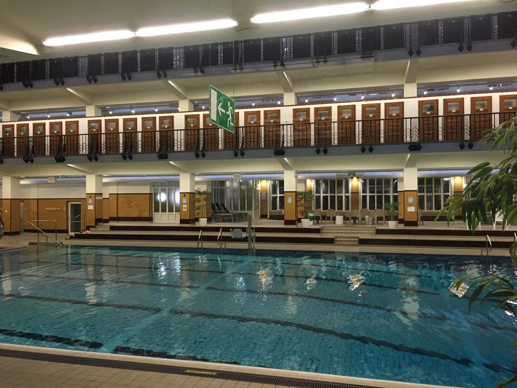 Amalienbad